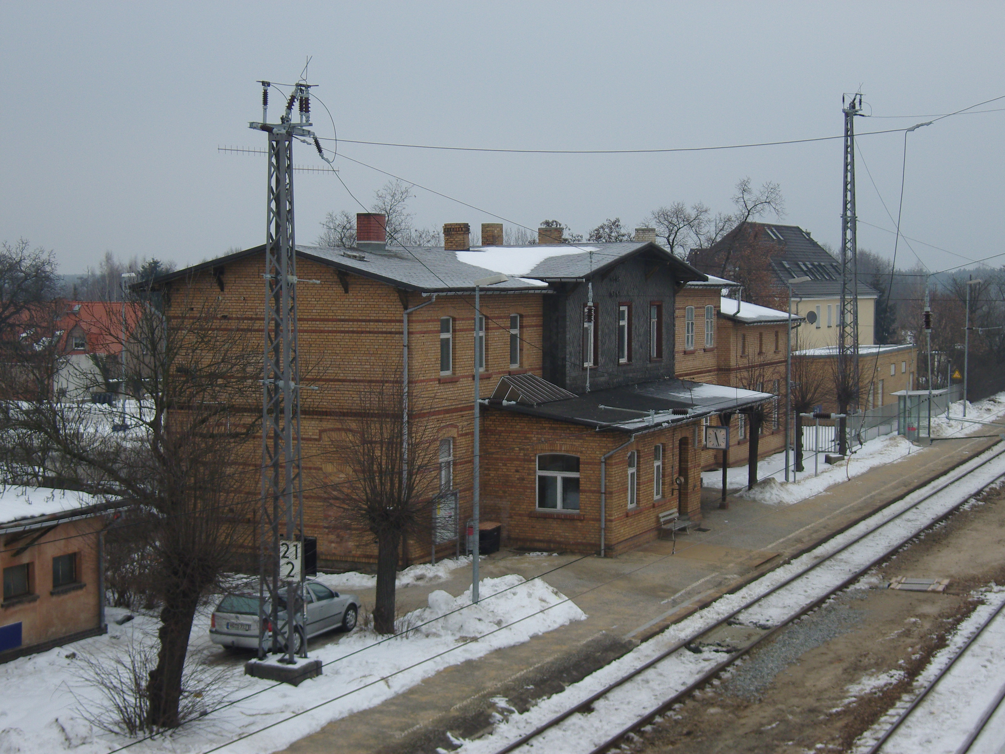 Bahnhof in Ortrand - Baudenkmal